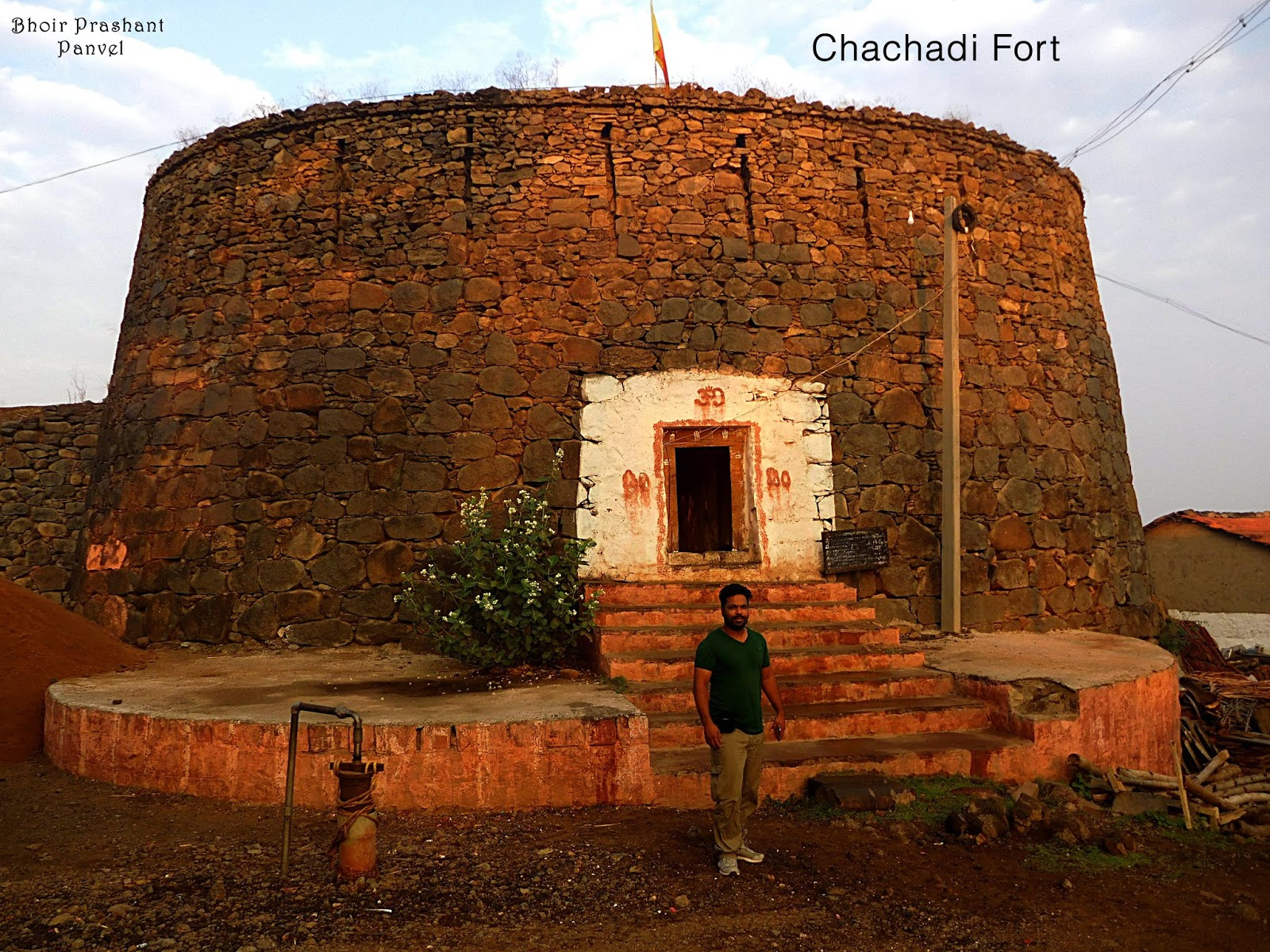 ಕನ್ನಡ: ೮೫೦ ವರ್ಷ ಇತಿಹಾಸದ ಚಚಡಿ ಕೋಟೆ ಮುಂಭಾಗ